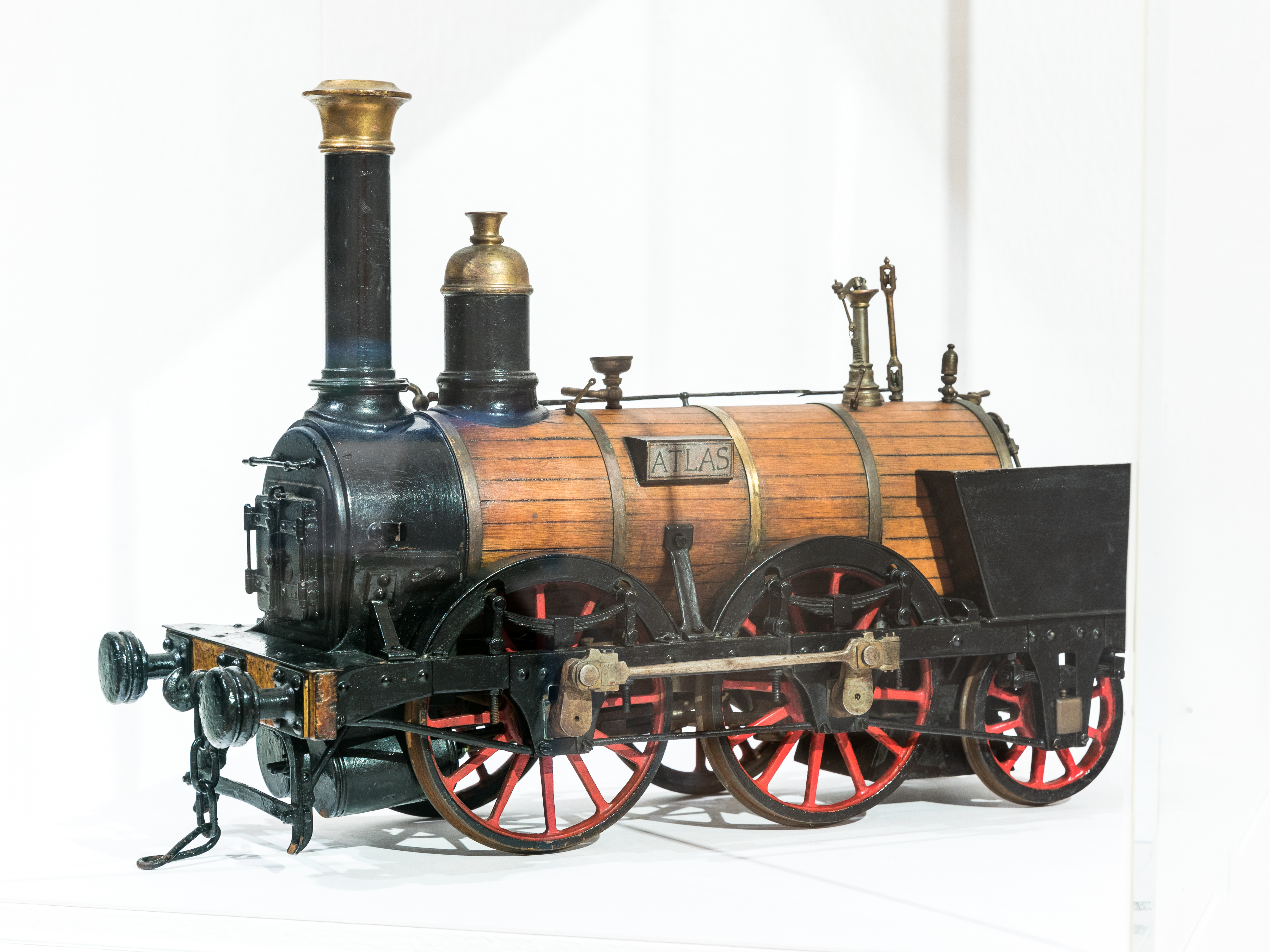 Bretter, die die Welt bedeuten. Spielend durch 2000 Jahre Köln Foto: Modell einer Lokomotive „Atlas“, Maßstab 1:20. Lehrlingswerkstätten der Reichsbahn (Hersteller). Köln, um 1935. Eisen, Holz. Bestand Kölnisches Stadtmuseum. Das Original wurde 1937 zusammen mit zwei kleineren Maschinen „Pluto“ und „Phönix“ beim englischen Hersteller Longridge, Starbuck & Co., Newcastle, bestellt. Am 2. August 1939 zogen „Atlas“ und „Pluto“ erstmals einen Zug vom Kölner Bahnhof „Am Thürmchen“ bis nach Müngersdorf